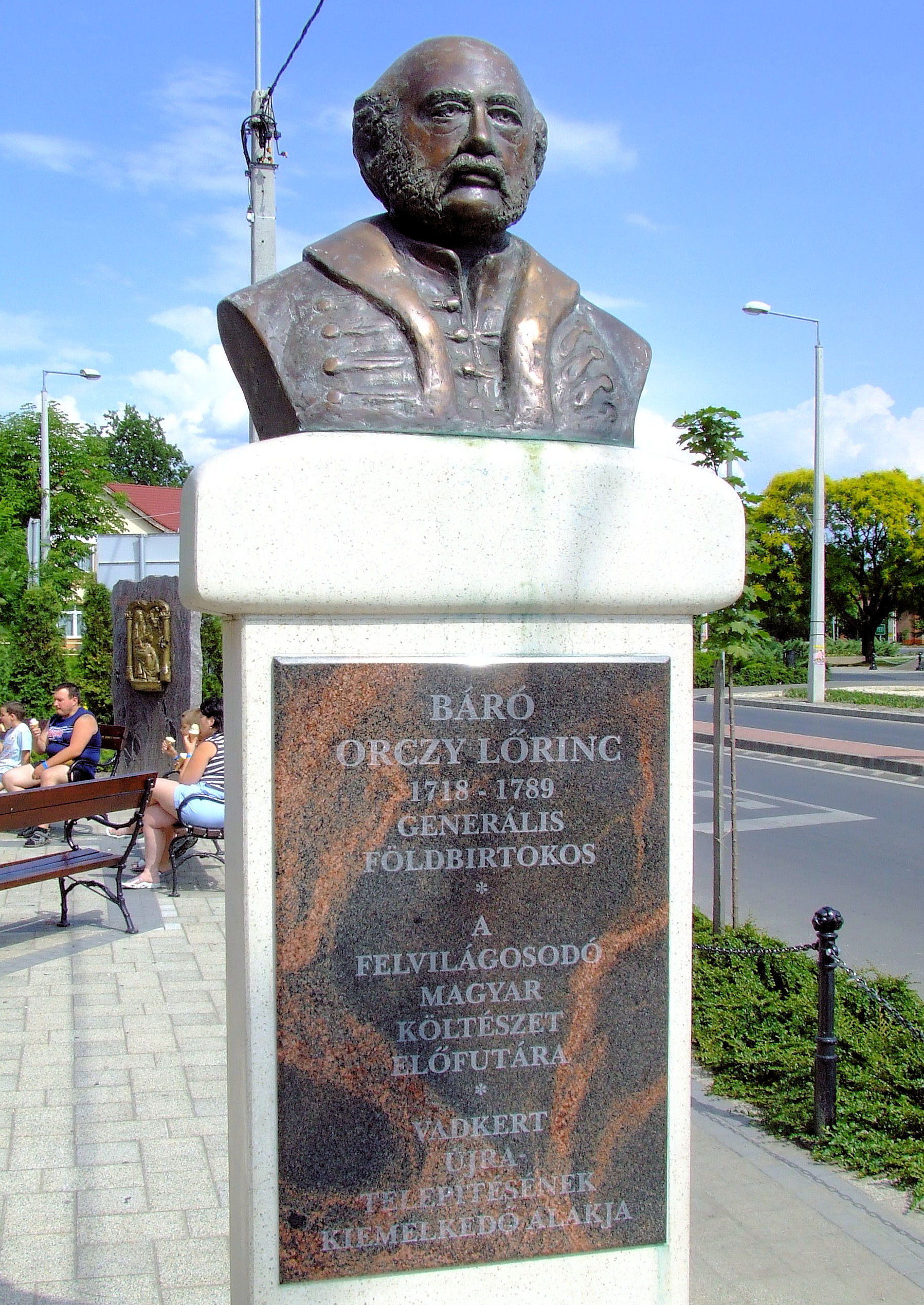 Orczy Lőrinc szobra Soltvadkerten. Windecker Zoltán alkotása